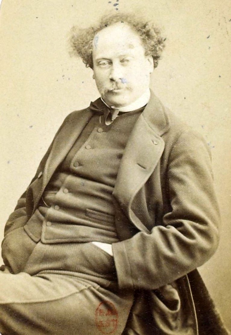 [Recueil. Personnalités des arts et des lettres] : vue 14 - F. 4v. Alexandre Dumas fils (Nadar phot.)